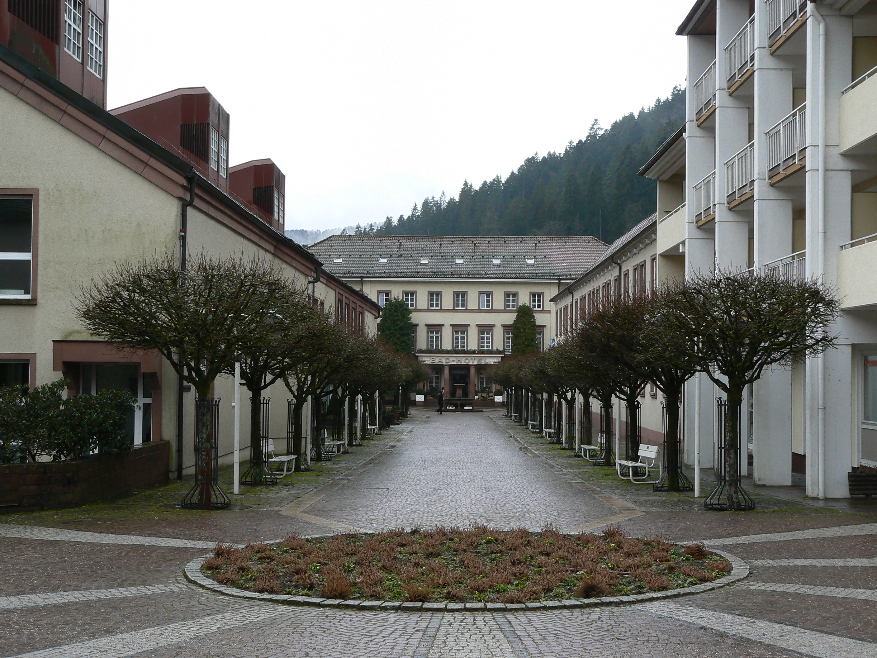 Ulice ve městě Bad Teinach